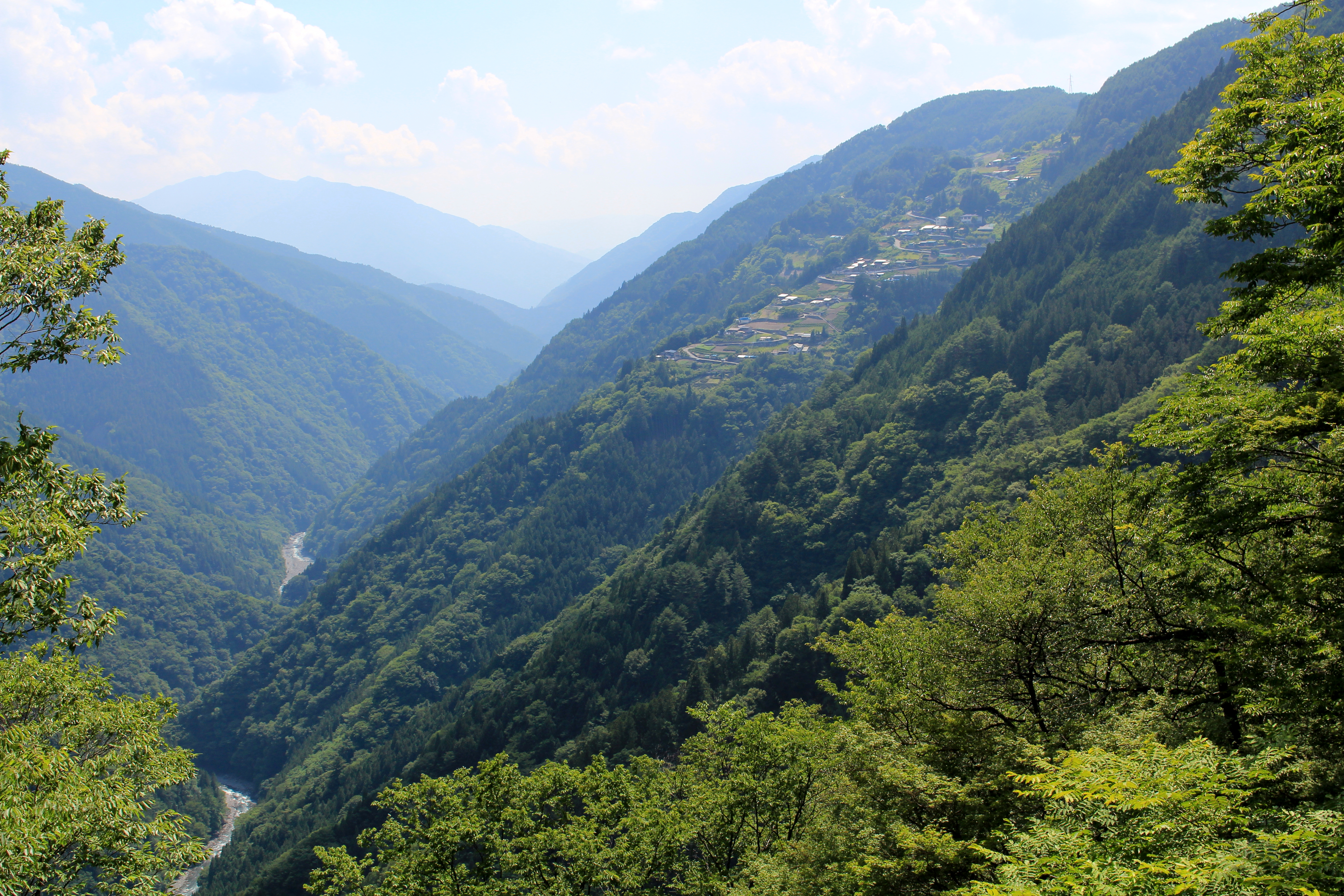 遠山川と下栗の里、長野県飯田市上村